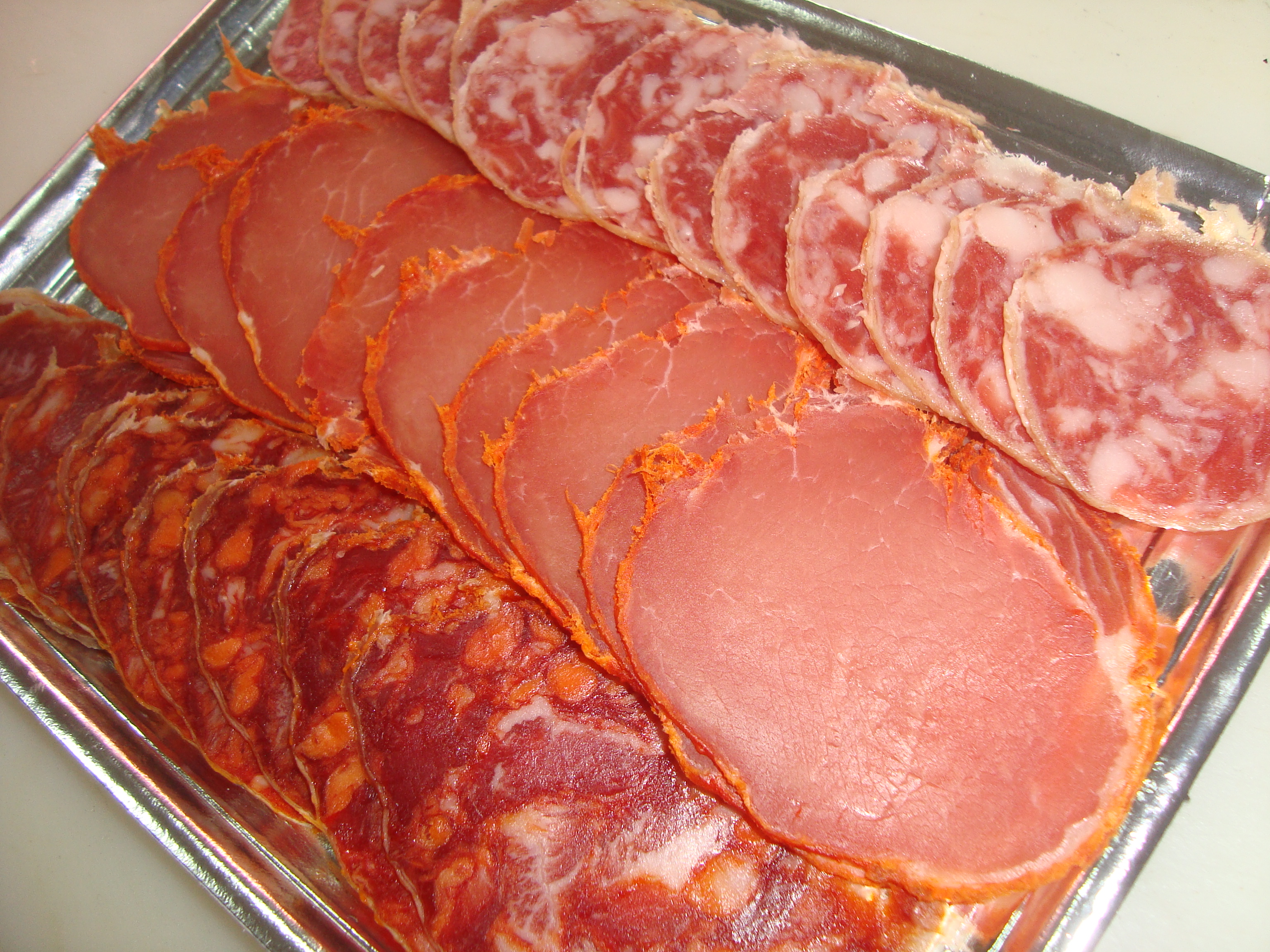 Tabla-presentación de embutidos (tapa)